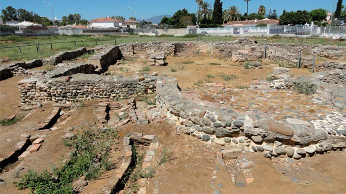 Vista general del yacimiento